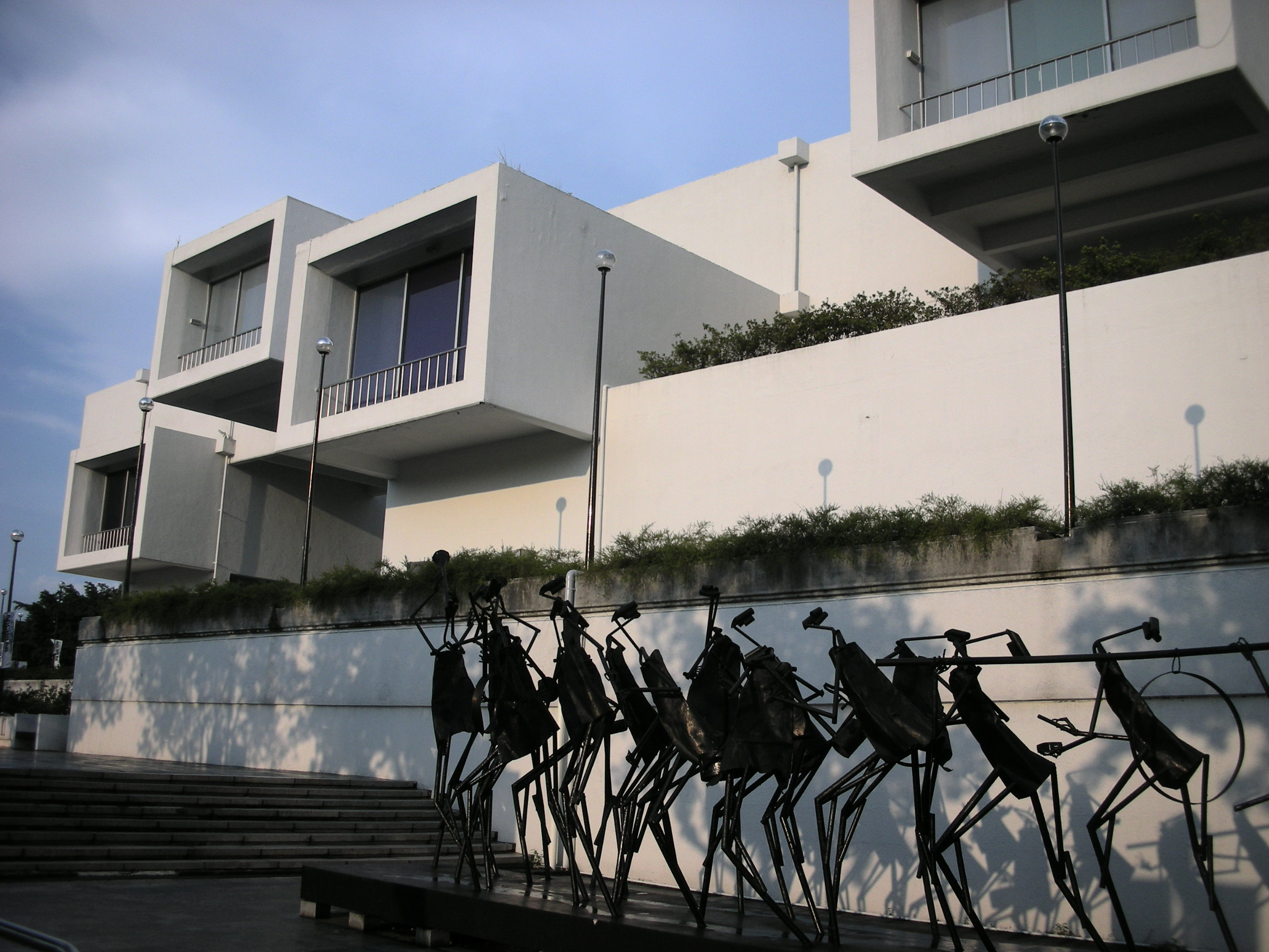 臺北市立美術館Taipei Fine Arts Museum10461台北市中山區中山北路三段181號 02-2595-7656